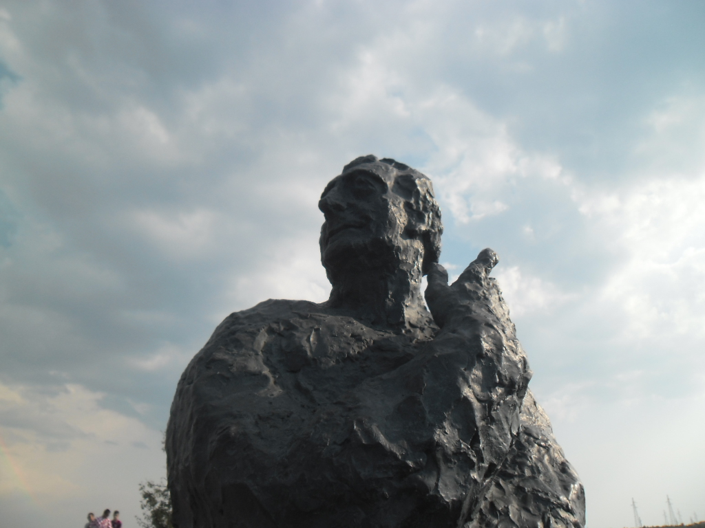 spomenik Franji Tuđmanu na kninskoj tvrđavi